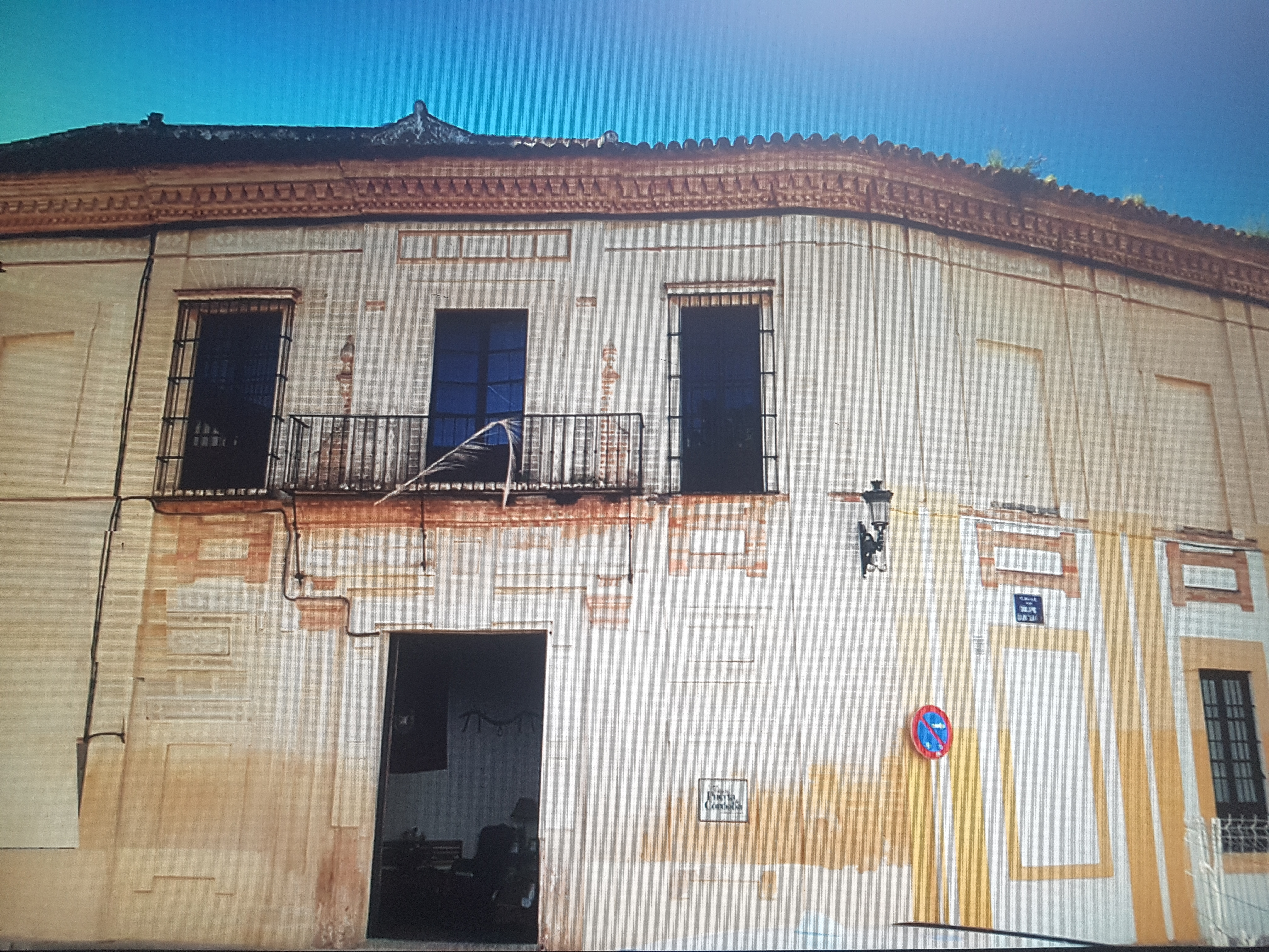 Esta Casa Palacio del Siglo XVIII era la Casa Solariega de los Tamariz en Carmona, Marqueses del Valle de la Reina, desde 1711. En el centro de la portada se encuentra su escudo con dos cuarteles, en el derecho el leon de los Tamariz y en el izquierdo la torre de Echevarria. Del yelmo sale una vitola, donde se puede leer invertido el apellido Tamaryz. Este escudo de armas sería el del II Marqués, Gonzalo Tamariz y Echevarria